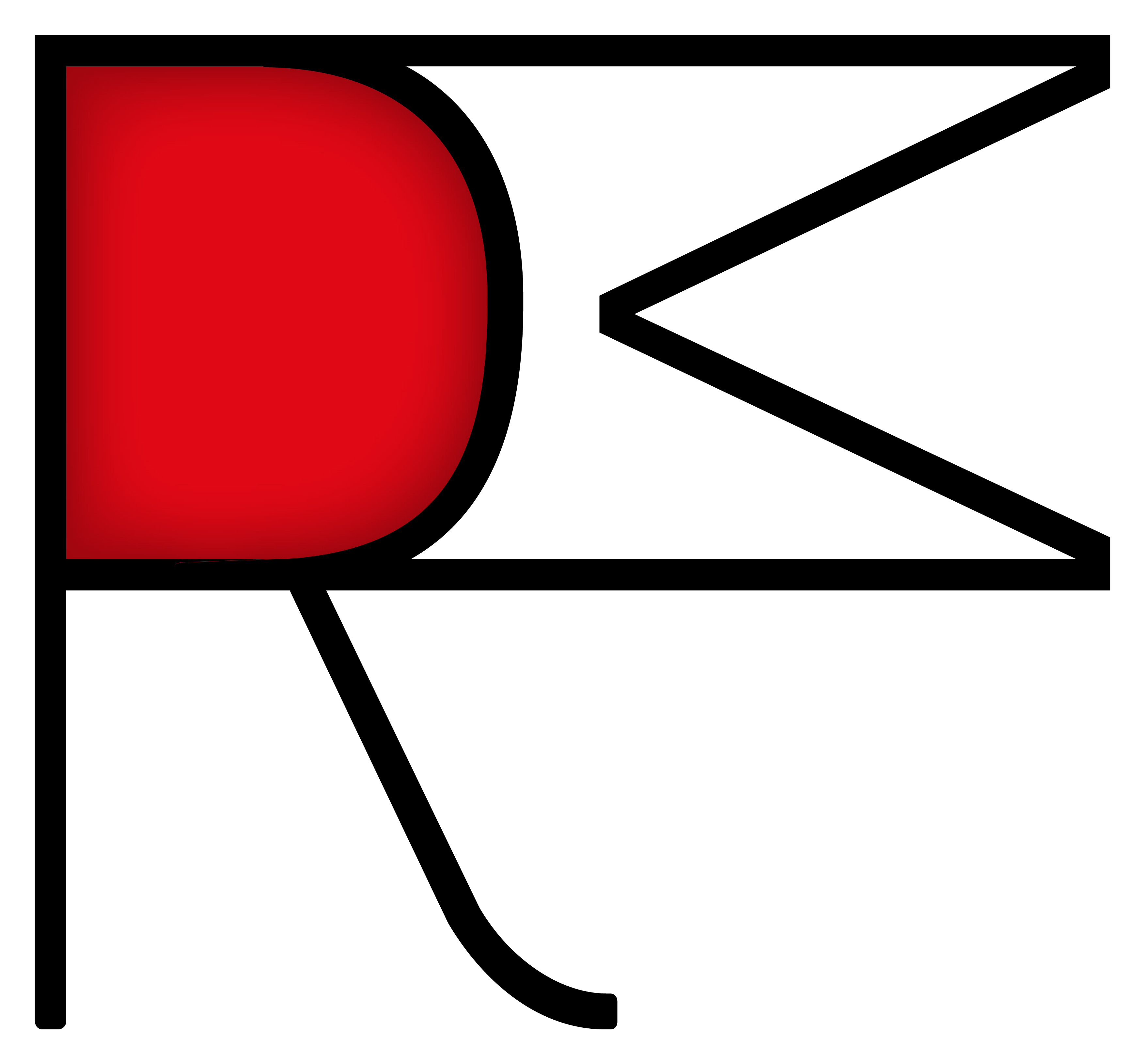 RADIO MARABU